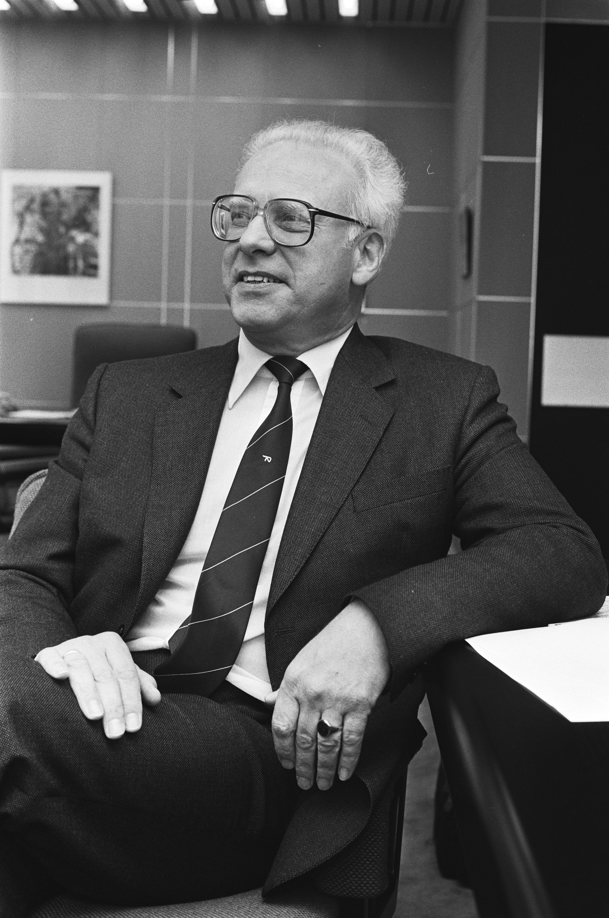 Collectie / Archief : Fotocollectie Anefo Reportage / Serie : [ onbekend ] Beschrijving : Opdracht Financieel Dagblad , heer Braakman, voorzitter Raad van Bestuur van Nationale Nederlanden , close Datum : 26 november 1985 Trefwoorden : voorzitters Instellingsnaam : Nationale Nederlanden Fotograaf : Croes, Rob C. / Anefo Auteursrechthebbende : Nationaal Archief Materiaalsoort : Negatief (zwart/wit) Nummer archiefinventaris : bekijk toegang 2.24.01.05 Bestanddeelnummer : 933-4941